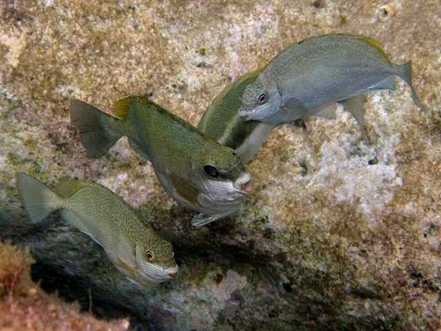 Grupo de Siganus luridus en Donoussa, Grecia. Ejemplares de unos 14 cm de longitud. 2010